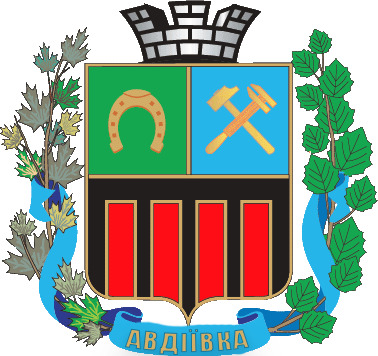 Герб Авдіївки